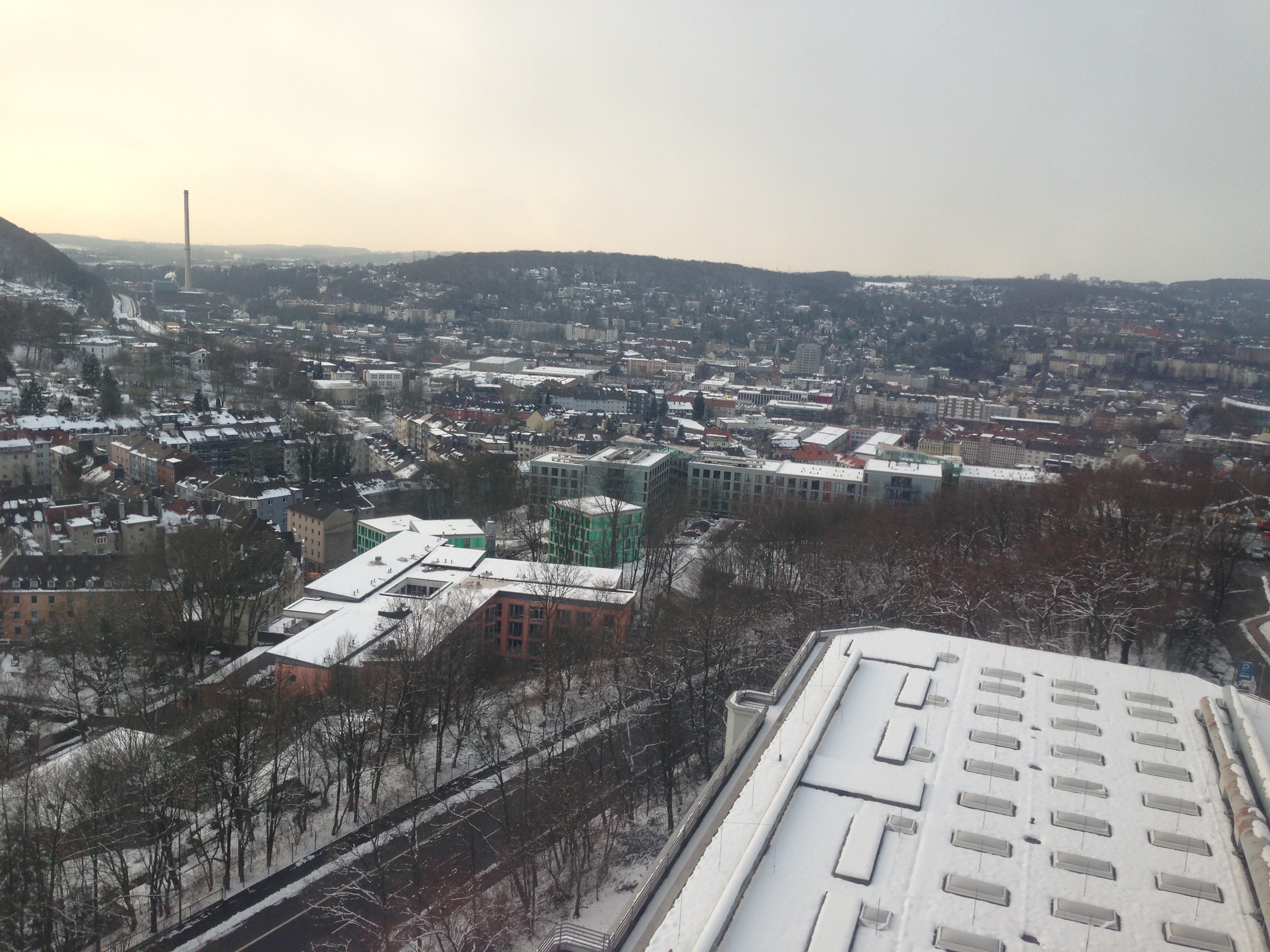 Blick von der Universität auf Elberfeld West, einen Teil des Wuppertaler Stadtteils Elberfeld